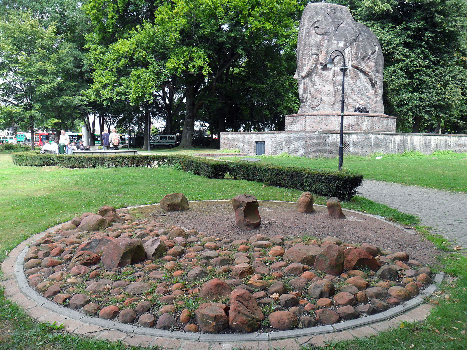 Antikolonialdenkmal in Bremen, im Vordergrund: Steine aus der Omaheke-Wüste